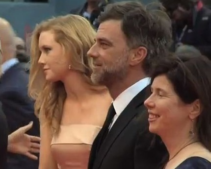 Съемочная группа фильма "Мастер" на на 69-м Венецианском кинофестивале